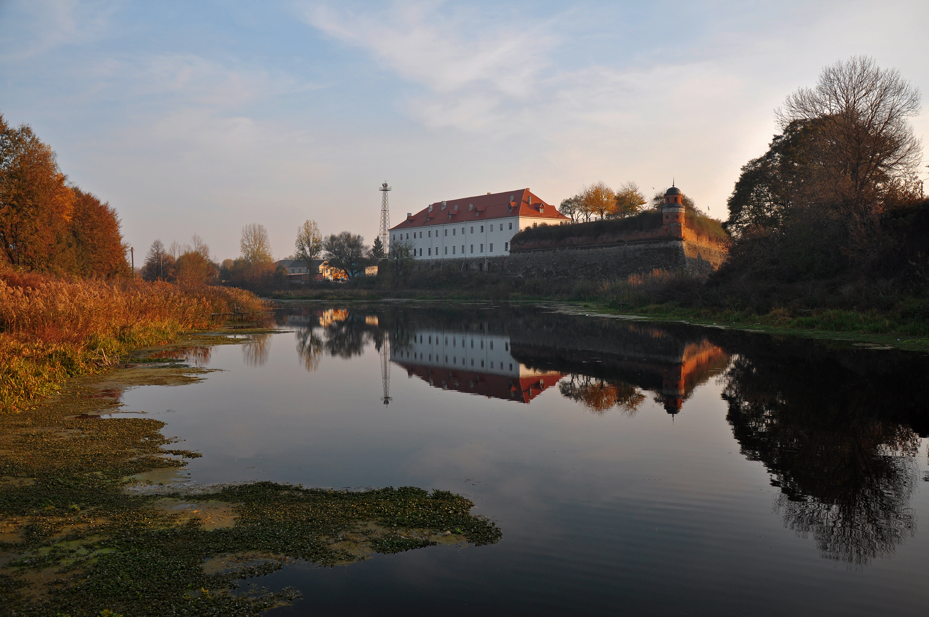 Замок князів Острозьких-Любомирських (мур.), Дубно, вул. Шевченка